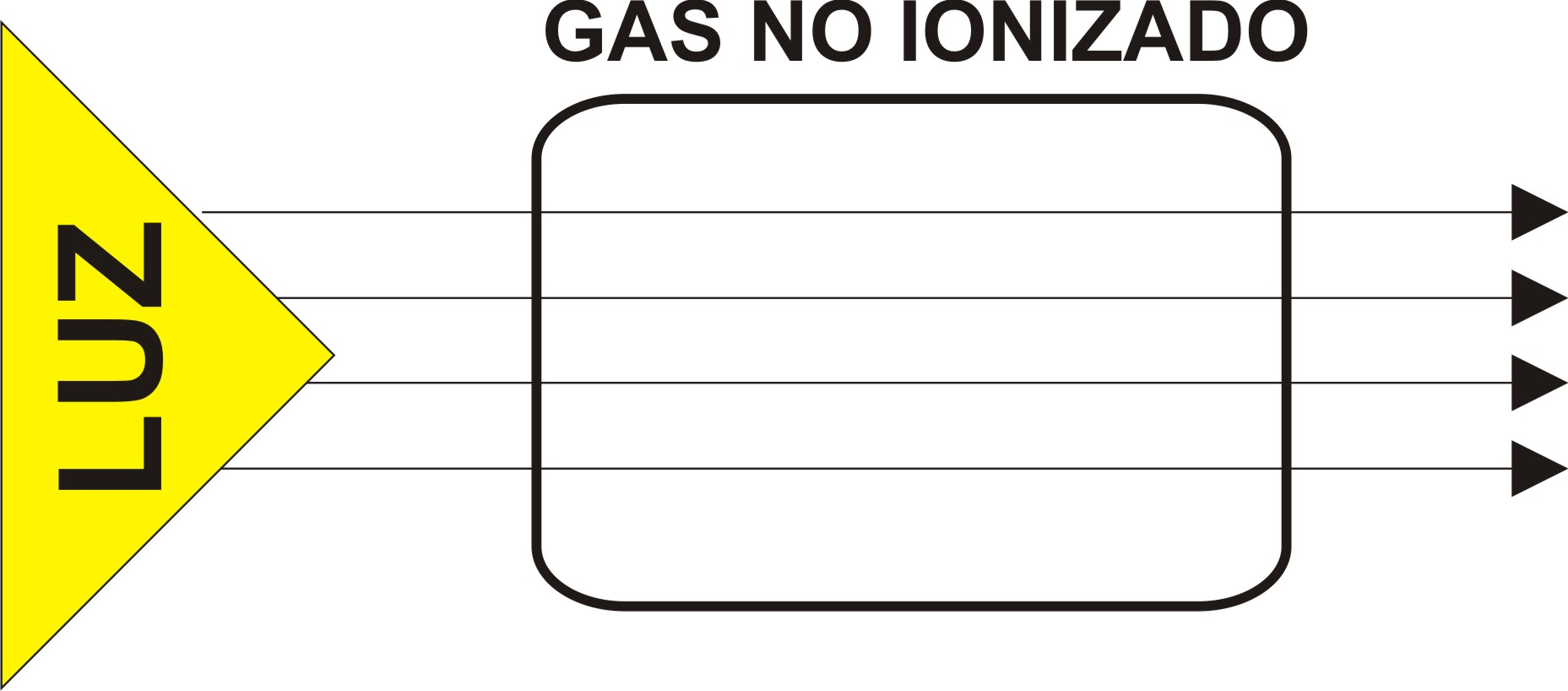 Gráfico sobre la refracción lumínica en un gas no ionizado